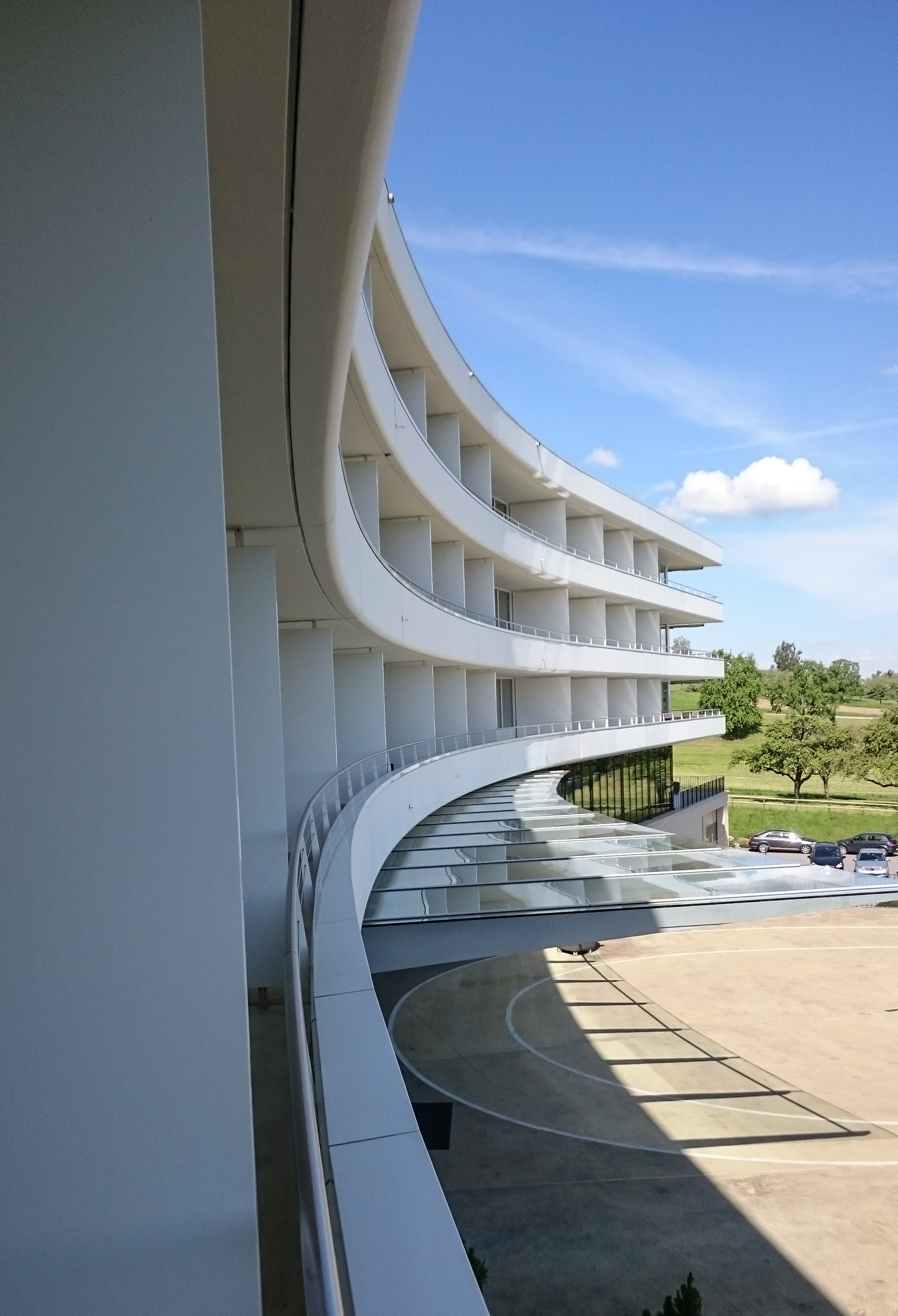 Zimmeraussicht auf Seite Bodensee